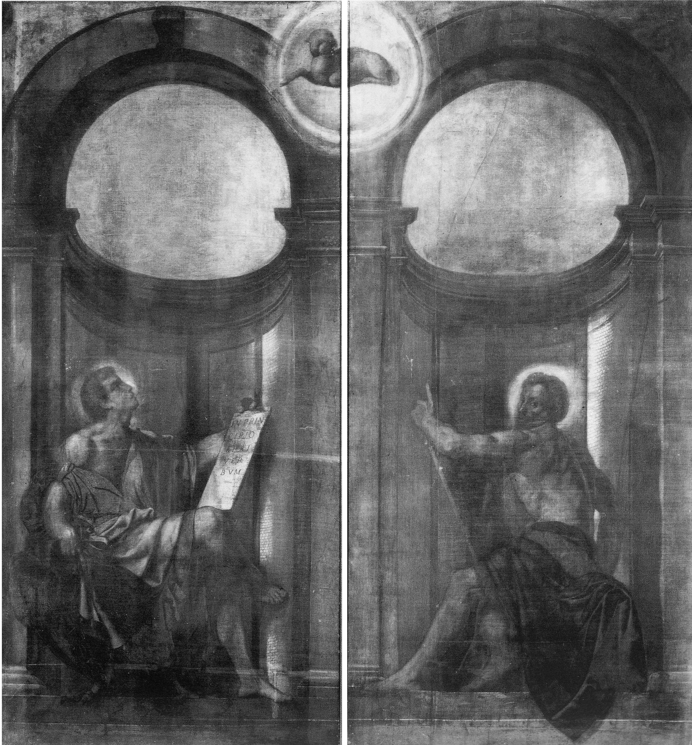 Ante dell'organo della chiesa di San Giovanni (Brescia)